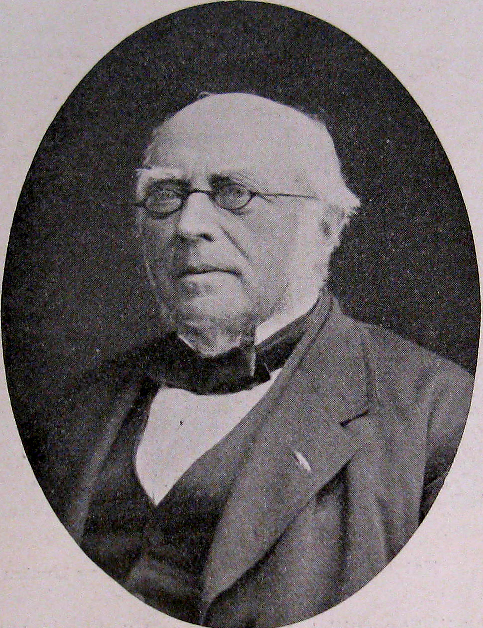 Conrad Peter Julius Krebs (2. juli 1809 i København – 13. november 1880 smst.) var en dansk professor, rektor og skoleleder.